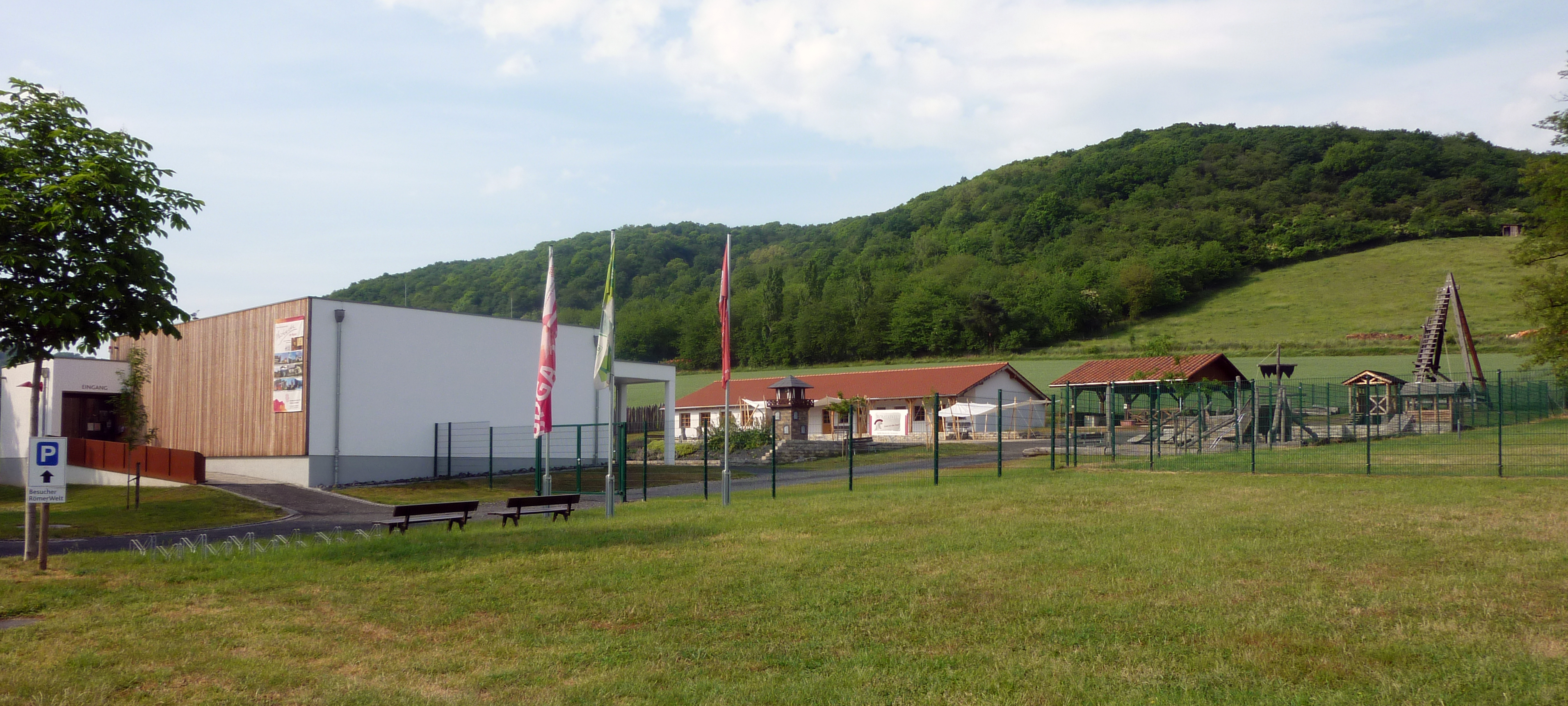 Limes-Museum Römerwelt in Rheinbrohl